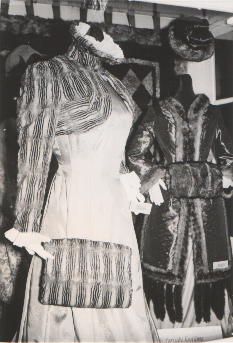 Zwei originalgetreu nachgebildete Modelle: Im Hintergrund Pelzmuff und pelzverbrämtes Kleid, 1880; vorn Burundukimuff und Kleid mit Burundukifell, 1900, dahinter eine Felldecke. 1963 anlässlich der Grünen Woche in Berlin, von der Interessengemeinschaft Berliner Kürschnermeister.